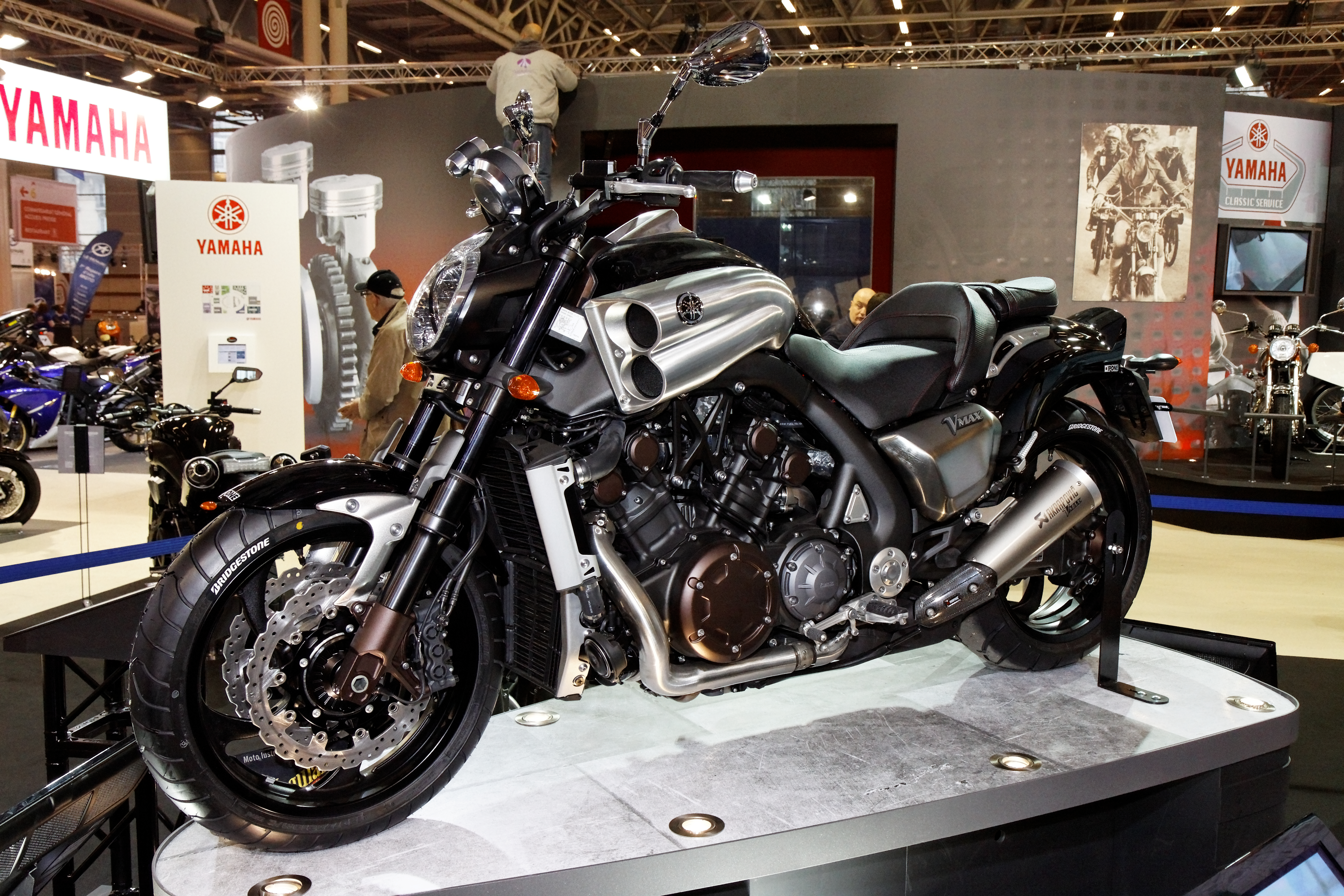 Une moto Yamaha au salon de la moto, Paris, porte de Versailles.